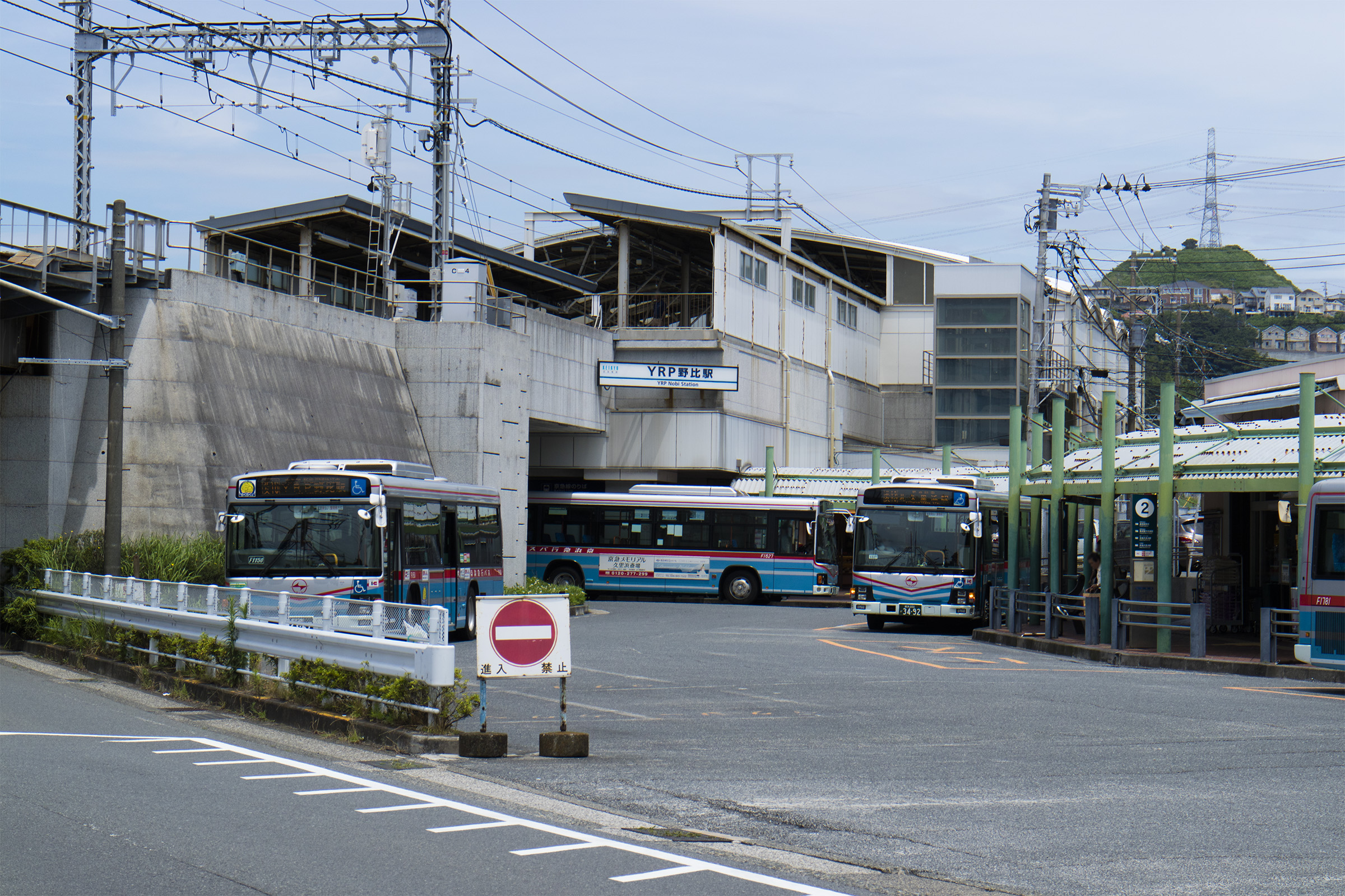 京浜急行電鉄株式会社久里浜線YRP野比駅正面（バスターミナル側）